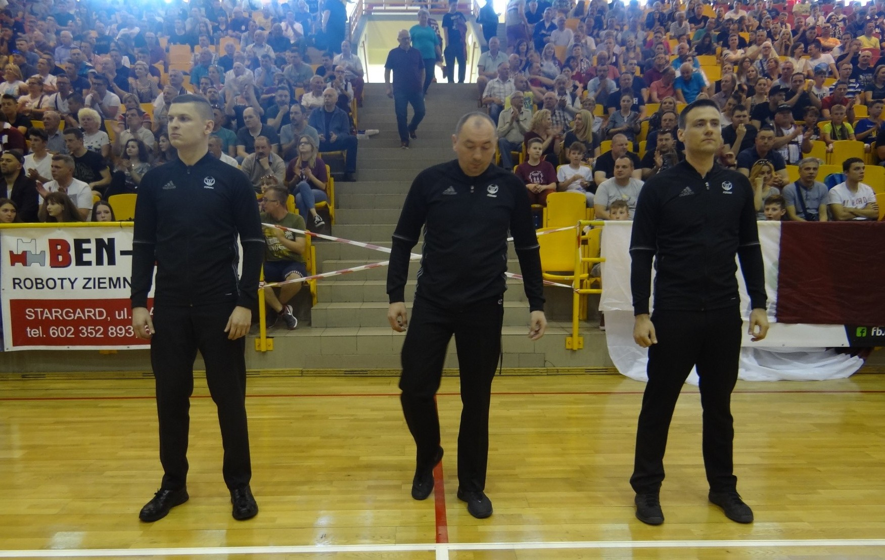 Sędziowie meczu Spójnia Stargard GKS Tychy (29.04.2018)